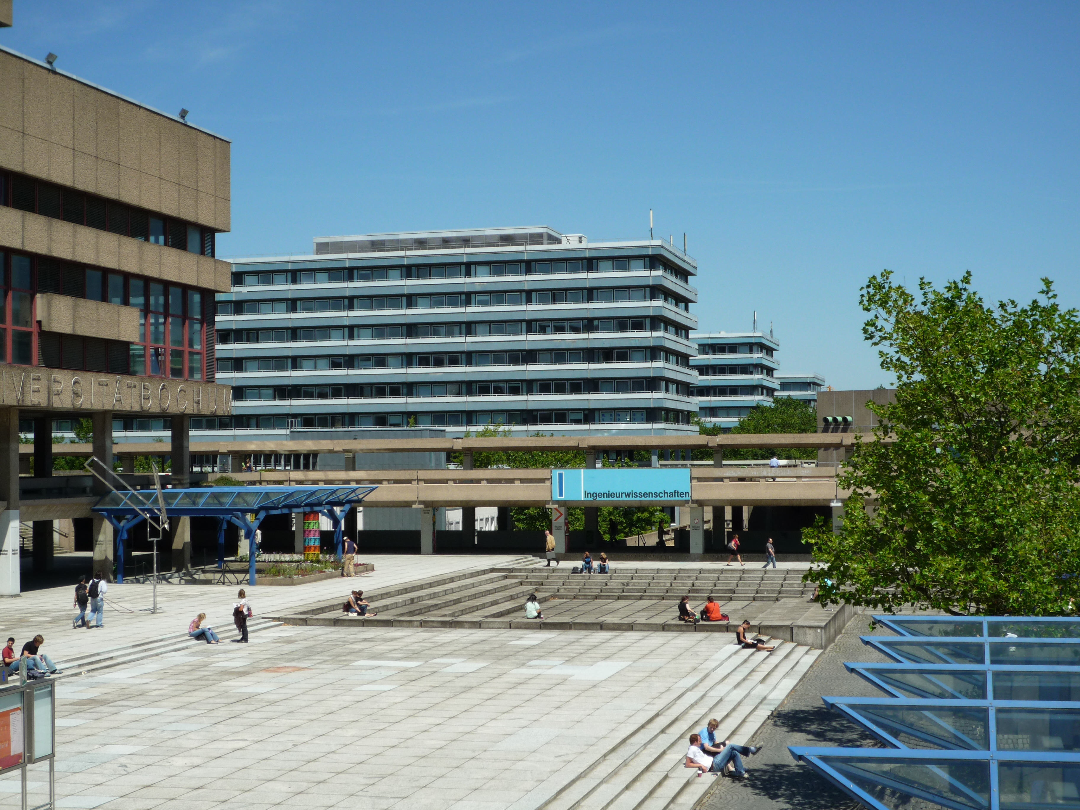 Die Ingenieurwissenschaftsgebäude der Ruhr-Universität Bochum